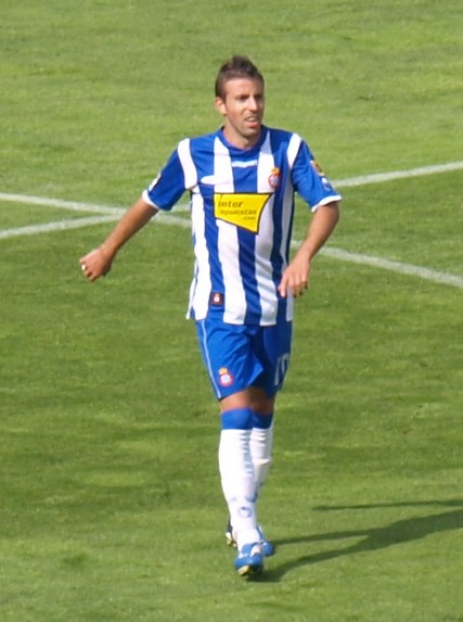 Luis García en el partido que enfrentó al RCD Español y al Málaga CF en el último partido de La Liga 2008/09 en el estadio Olímpico de Montjuic.